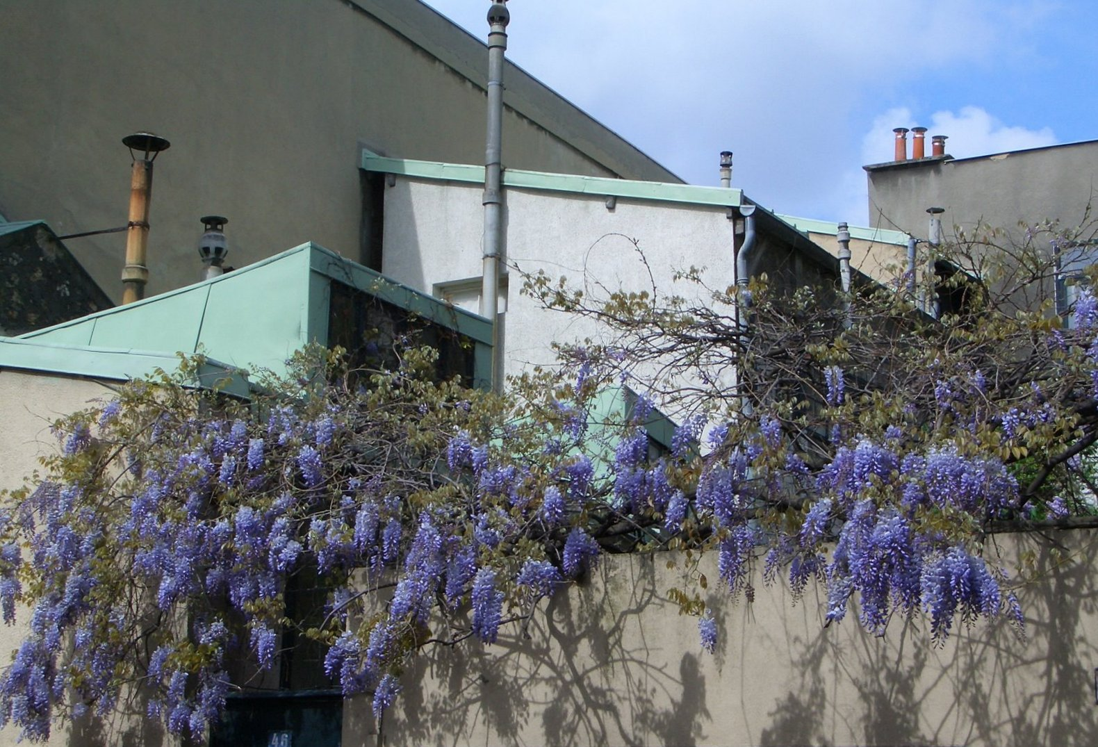 Ancien atelier de Giacometti 46 rue Hippolyte Maindron Paris XIVème